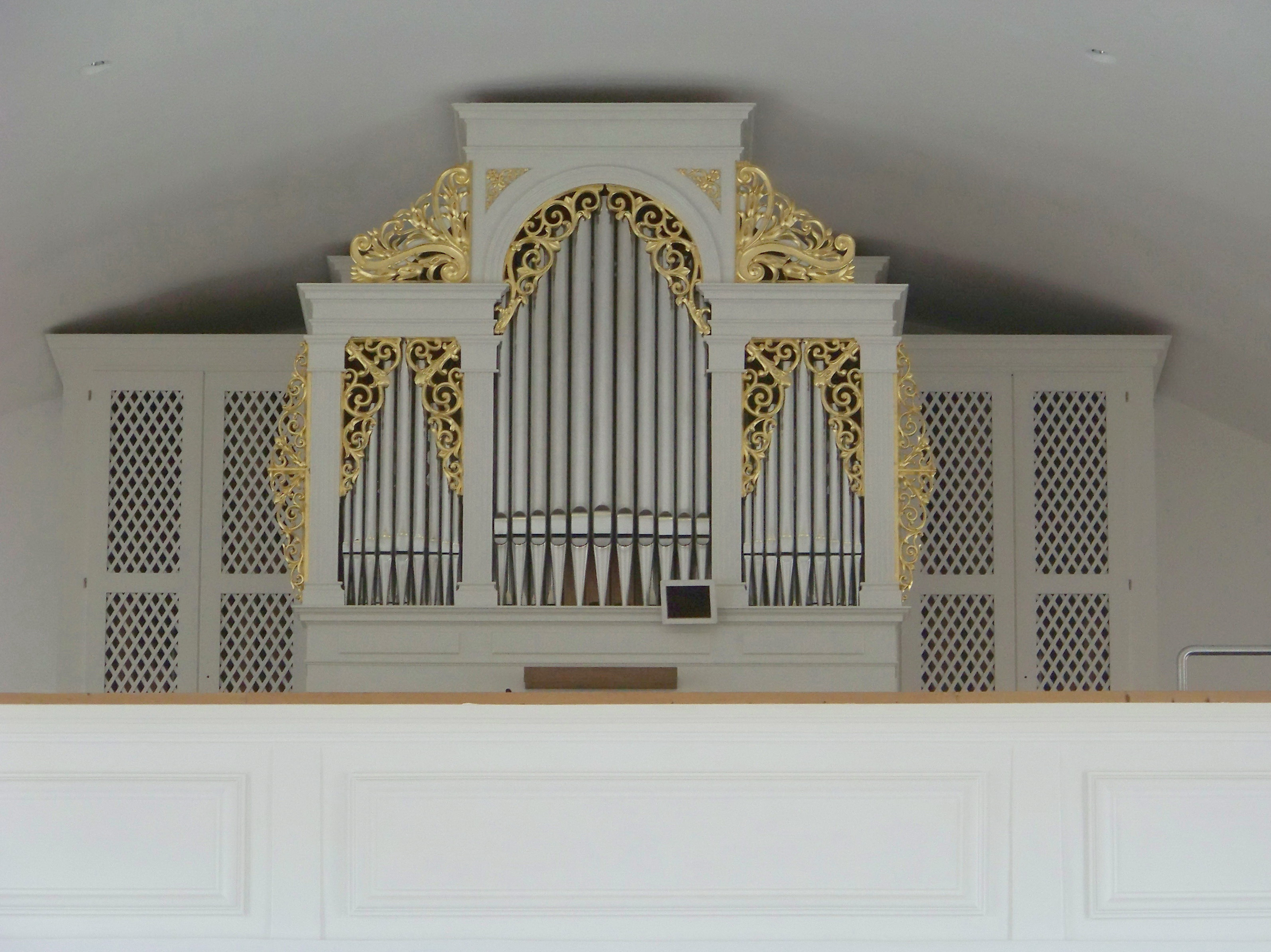 Ergoldsbach, Hauptstraße 18. Katholische Pfarrkirche St. Peter und Paul. Die Orgel der Pfarrkirche wurde 1999 von der Firma Orgelbau Schädler aus Donaustauf erbaut. Der Oberbau des Prospektes wurde von der Weise Orgel aus Deggendorf aus dem Jahr 1920 übernommen